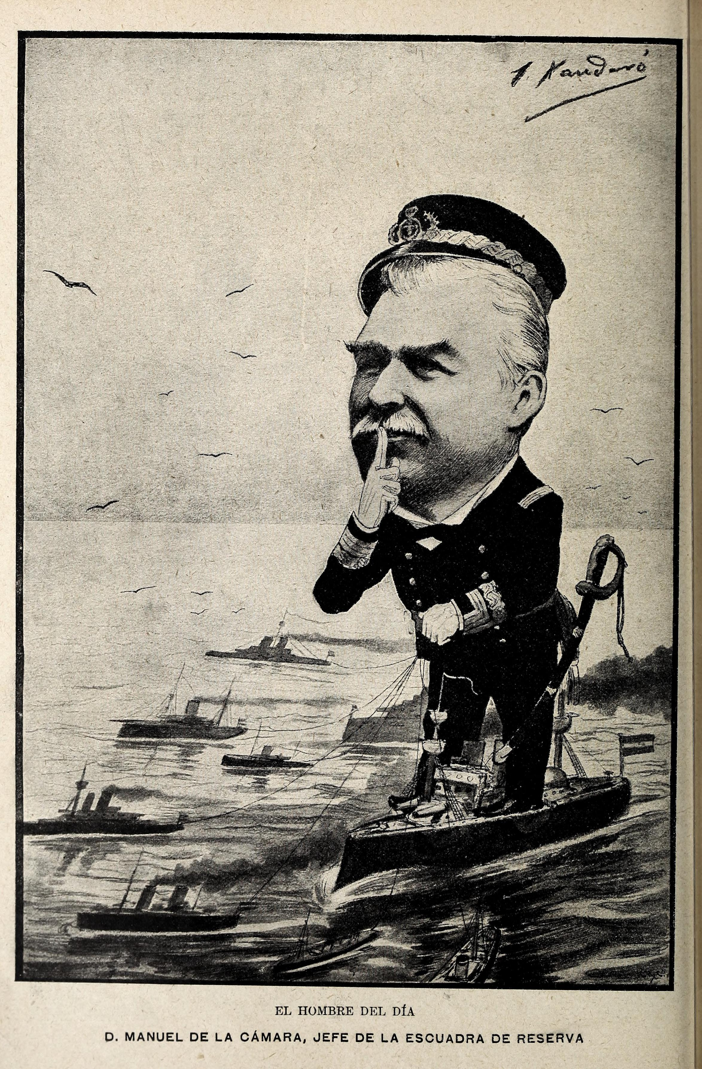 Manuel de la Cámara , jefe de la Escuadra de Reserva, de Xaudaró